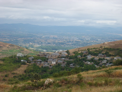 Vista general del pueblo, de fondo el bierzo bajo y Ponferrada